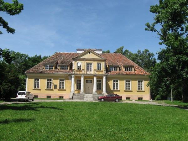 Dwór Roszkowskich w Tyborach-Kamiance 02.1953.